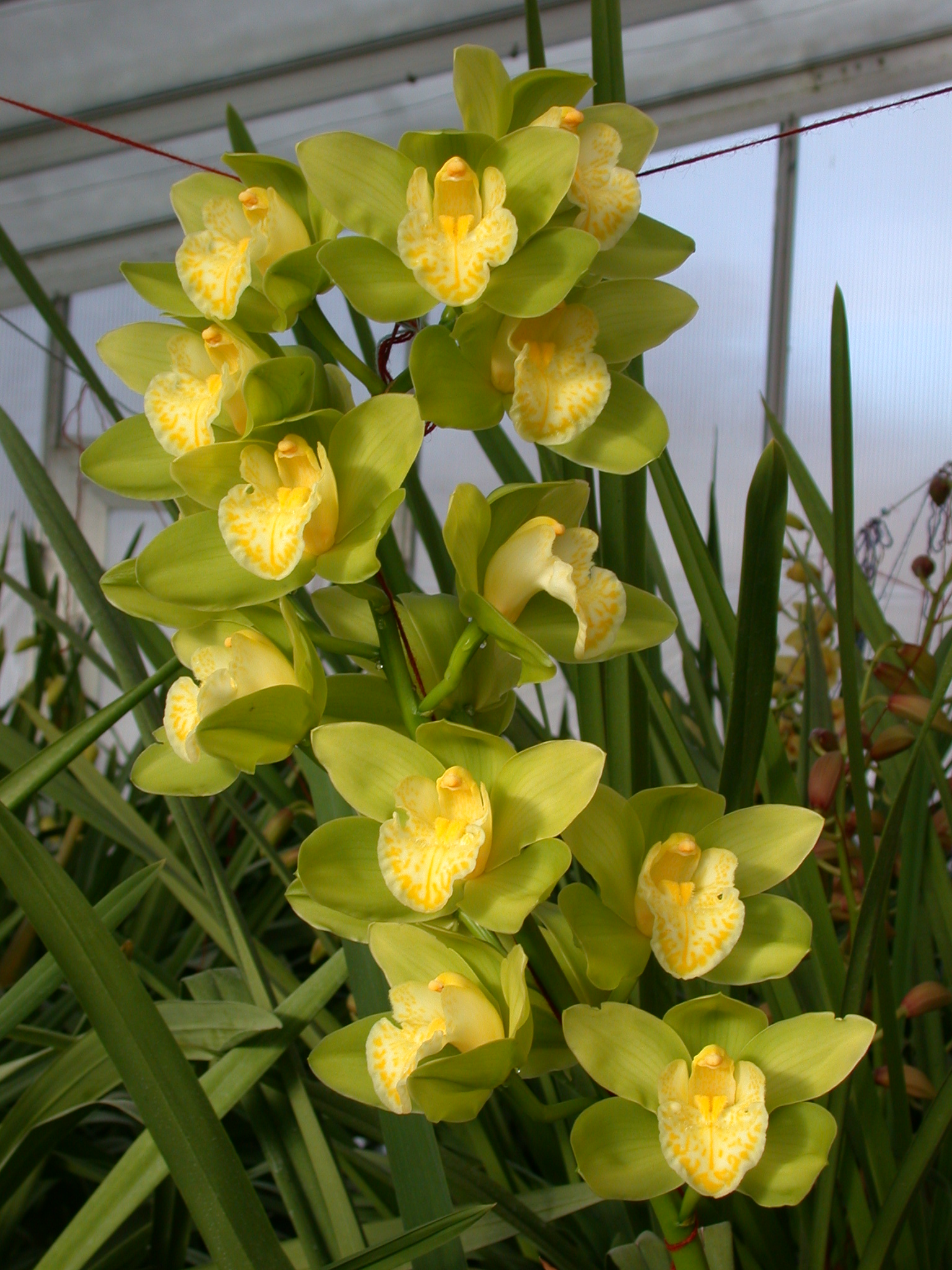 Cymbidium Eastern Star Kawano